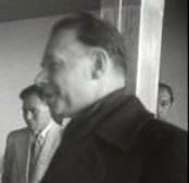 Koos Vorrink.